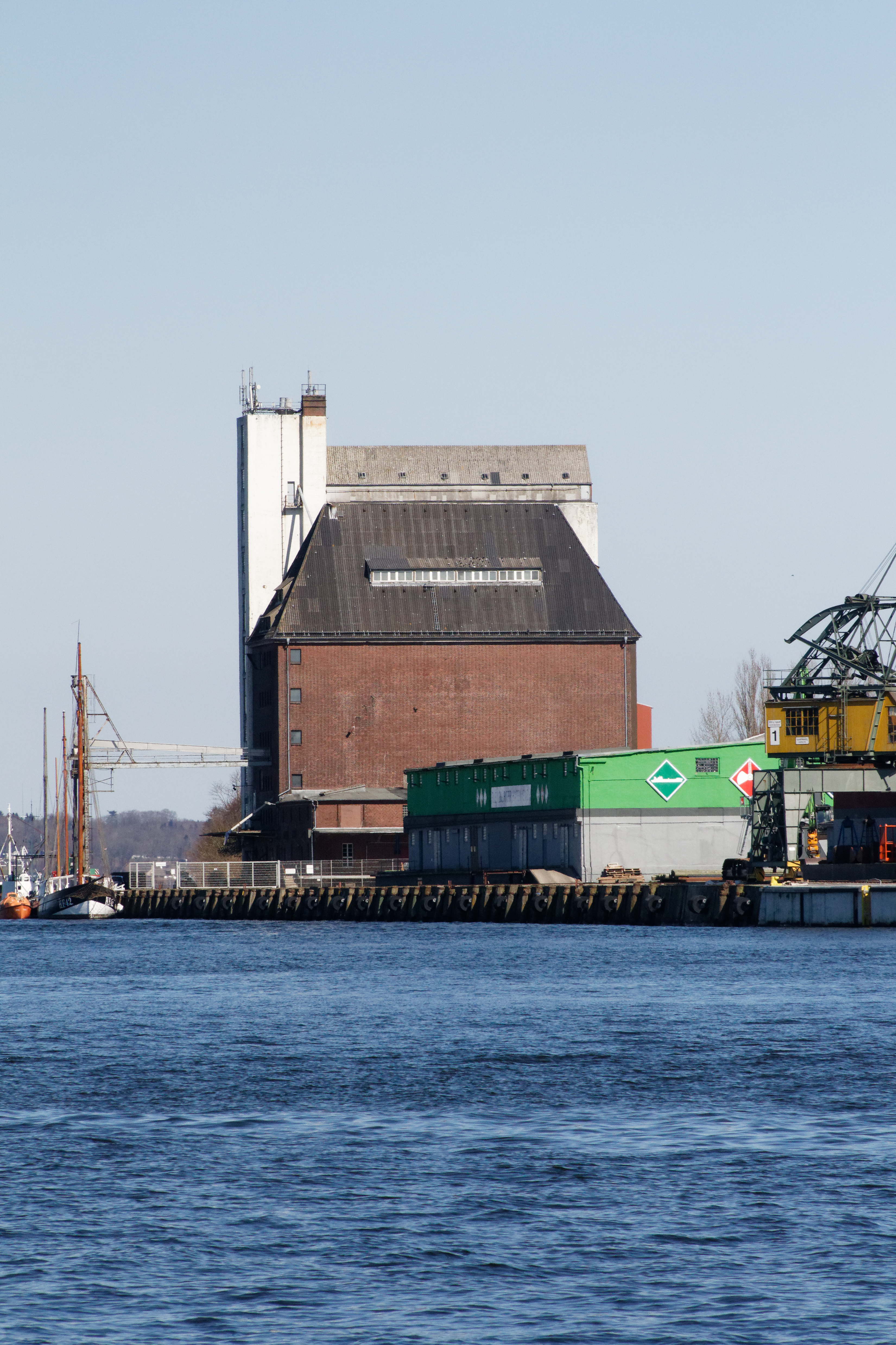 Flensburg, Hafen, Hafenspeicher